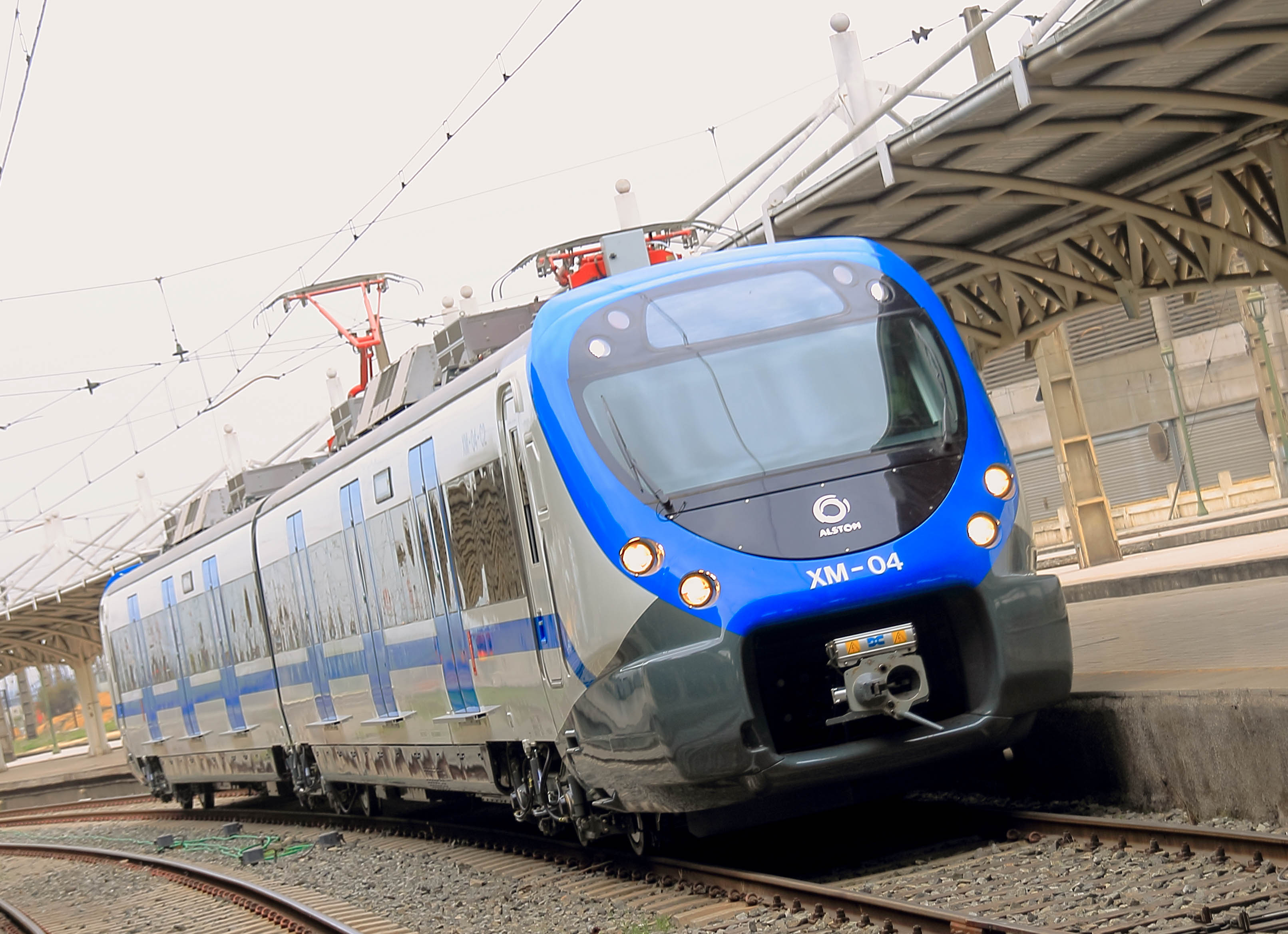 Ayer, se presentaron en sociedad, los nuevos trenes adquiridos por la estatal Grupo Efe, para los servicios de cercanías, Rancagua Express y Nos Express, equipos 0 km. que esperan debutar en un año mas. Ingresando al anden 5 de Alameda, el Xtrapolis Modular 04 construido por Alstom en su planta de España. Alameda, Septiembre 2014